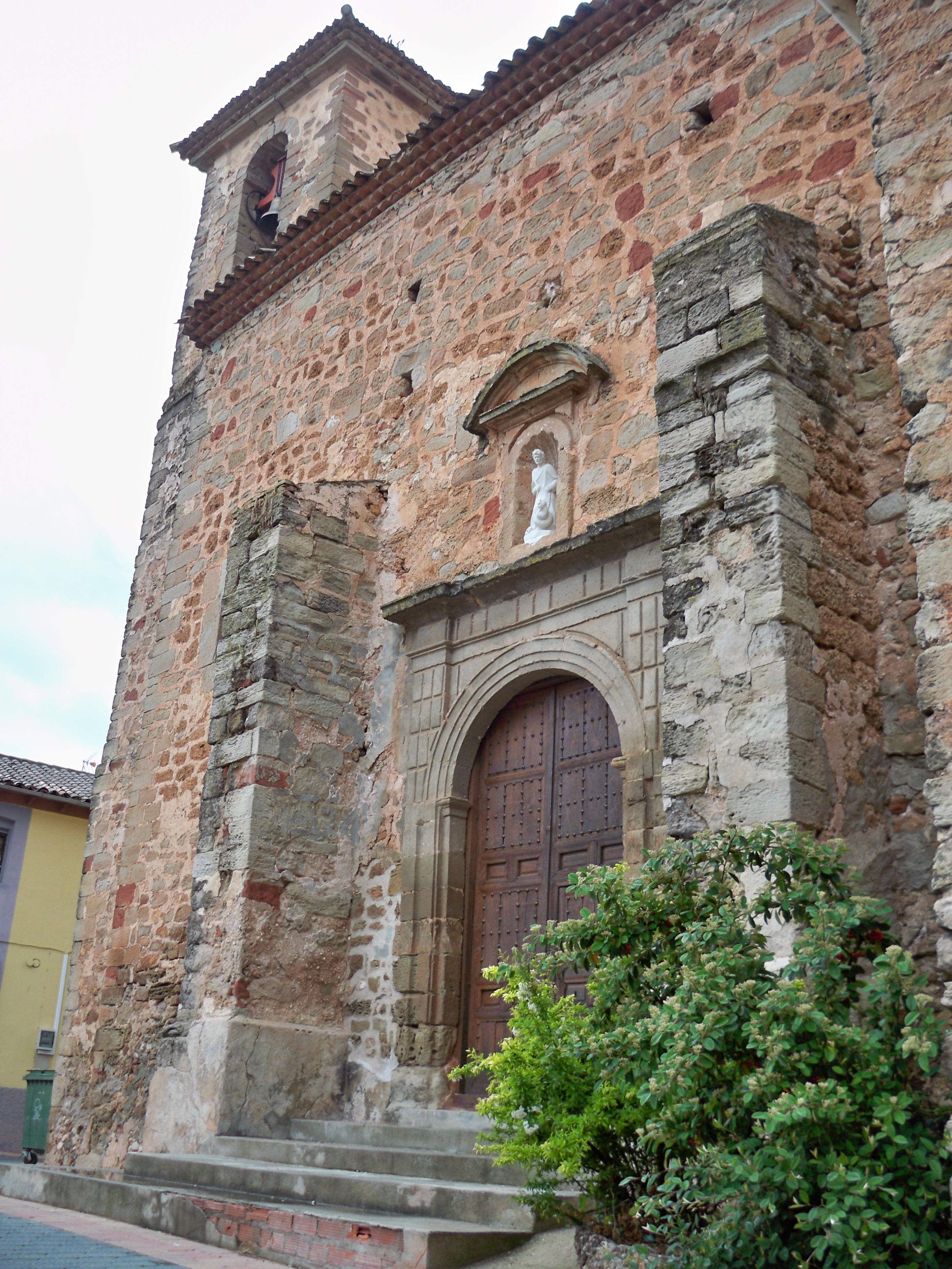 Una de las puertas de la Iglesia de San Sebastián de la localidad de Bienservida (Albacete)